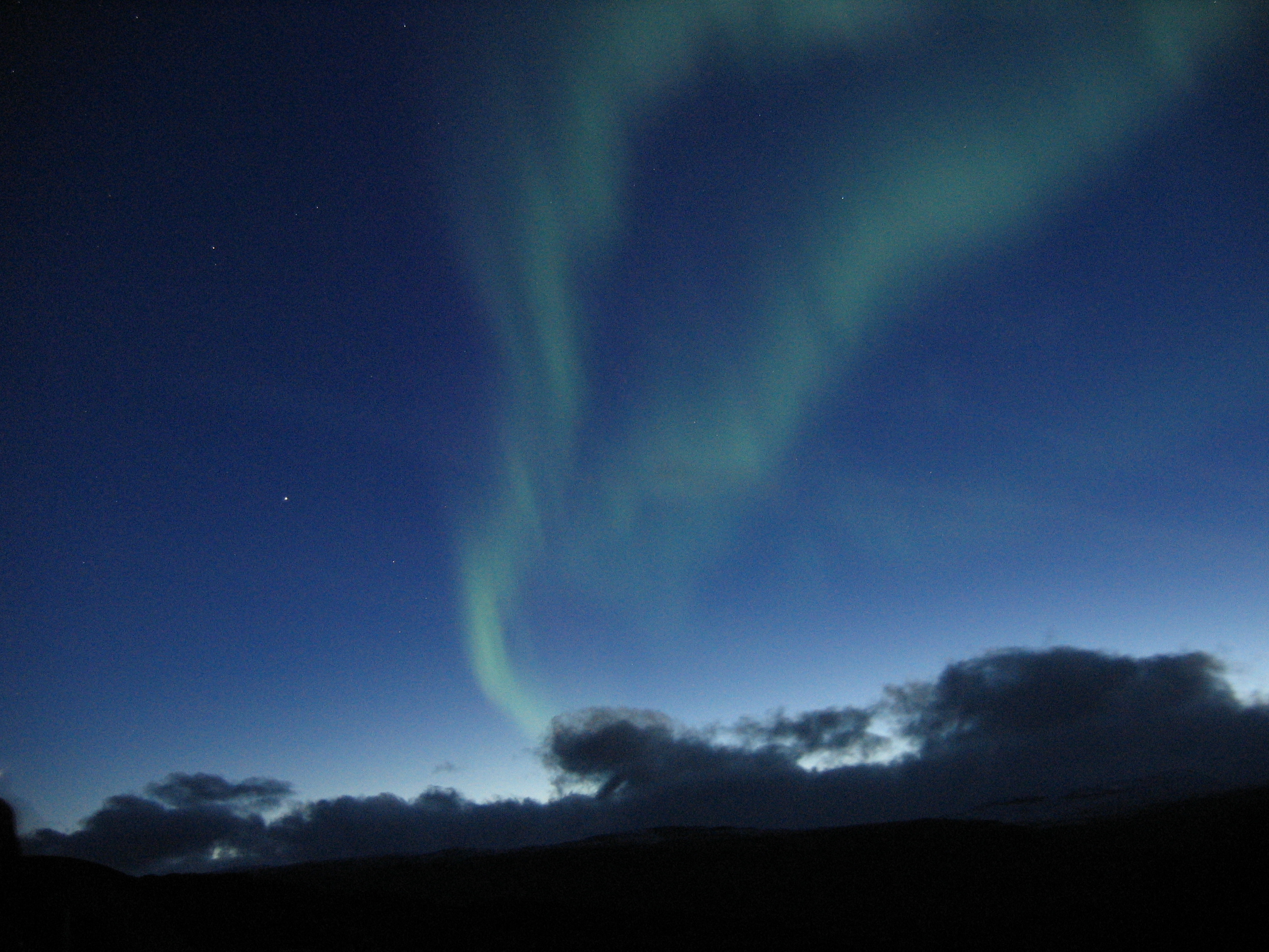 Picture taken at Tältlägret, near Abisko, Kiruna Kommun, Lappland, Norrbotten, Sweden.